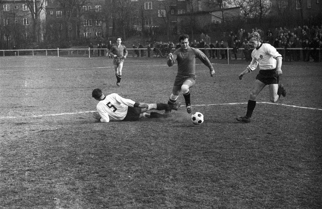 auf dem Blaschkesportplatz an der Norddeutschen Straße.